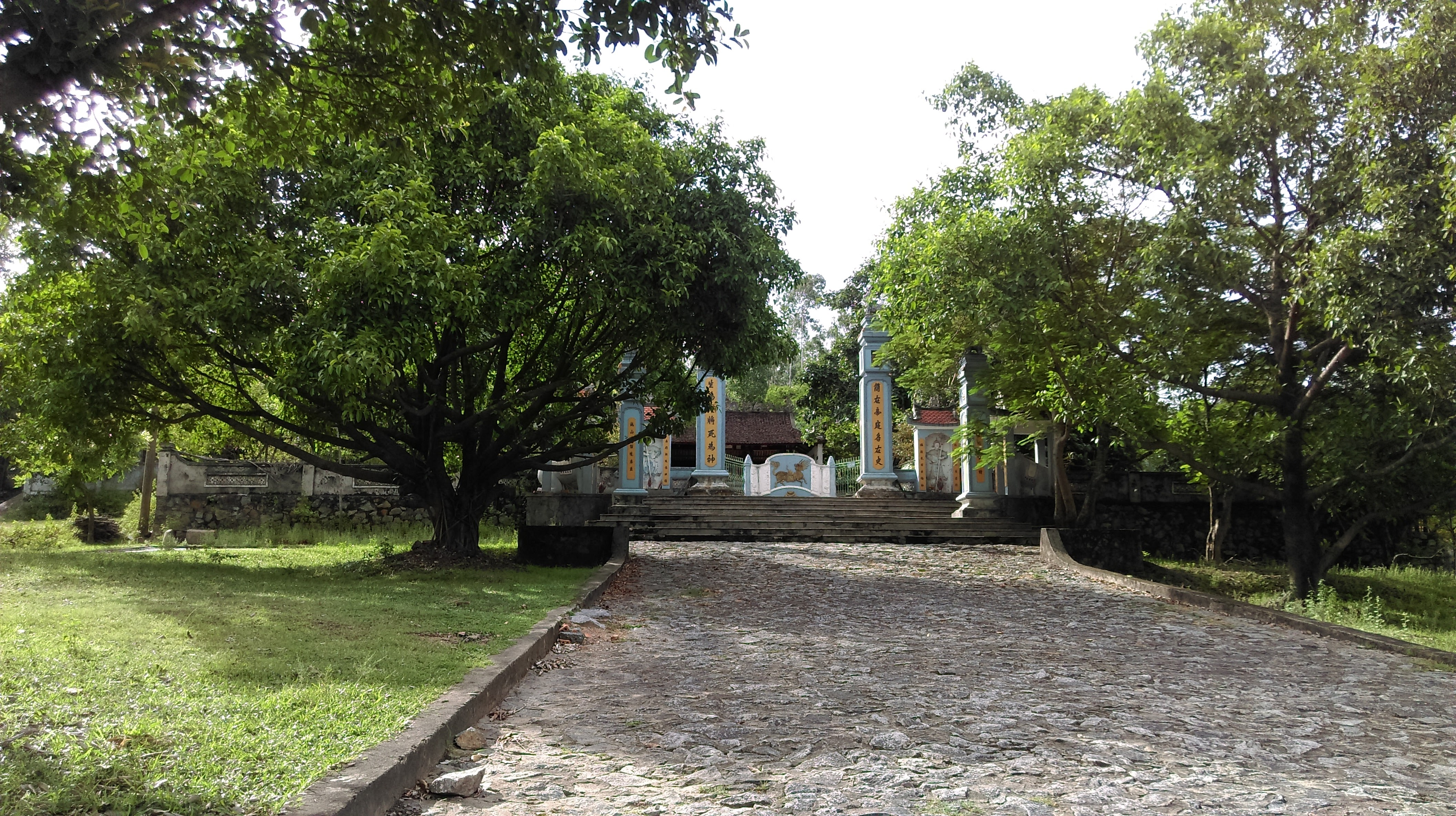 Đền thờ Bùi Cầm Hổ, Đậu Liêu, Hồng Lĩnh, Hà Tĩnh